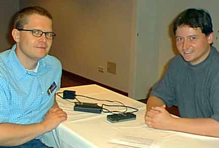 Links Stefan Meyer-Kahlen (Entwickler von Shredder) bei einem Interview von Axel Fritz , Chess Classic Mainz 2001.